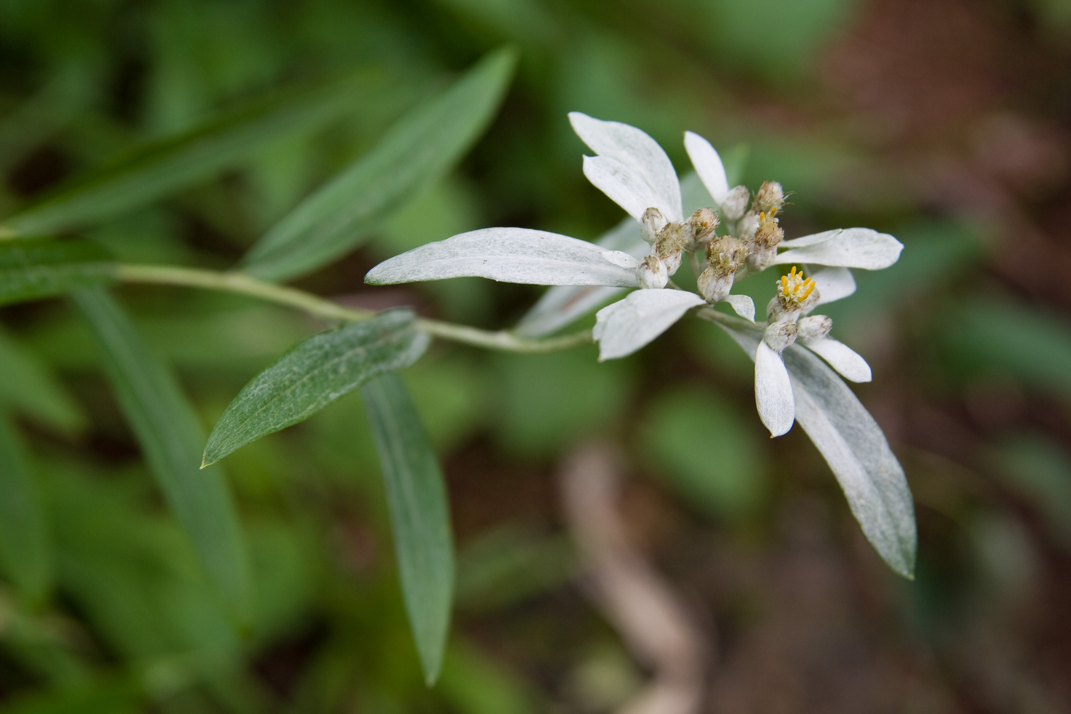 ウスユキソウ (学名:Leontopodium japonicum)